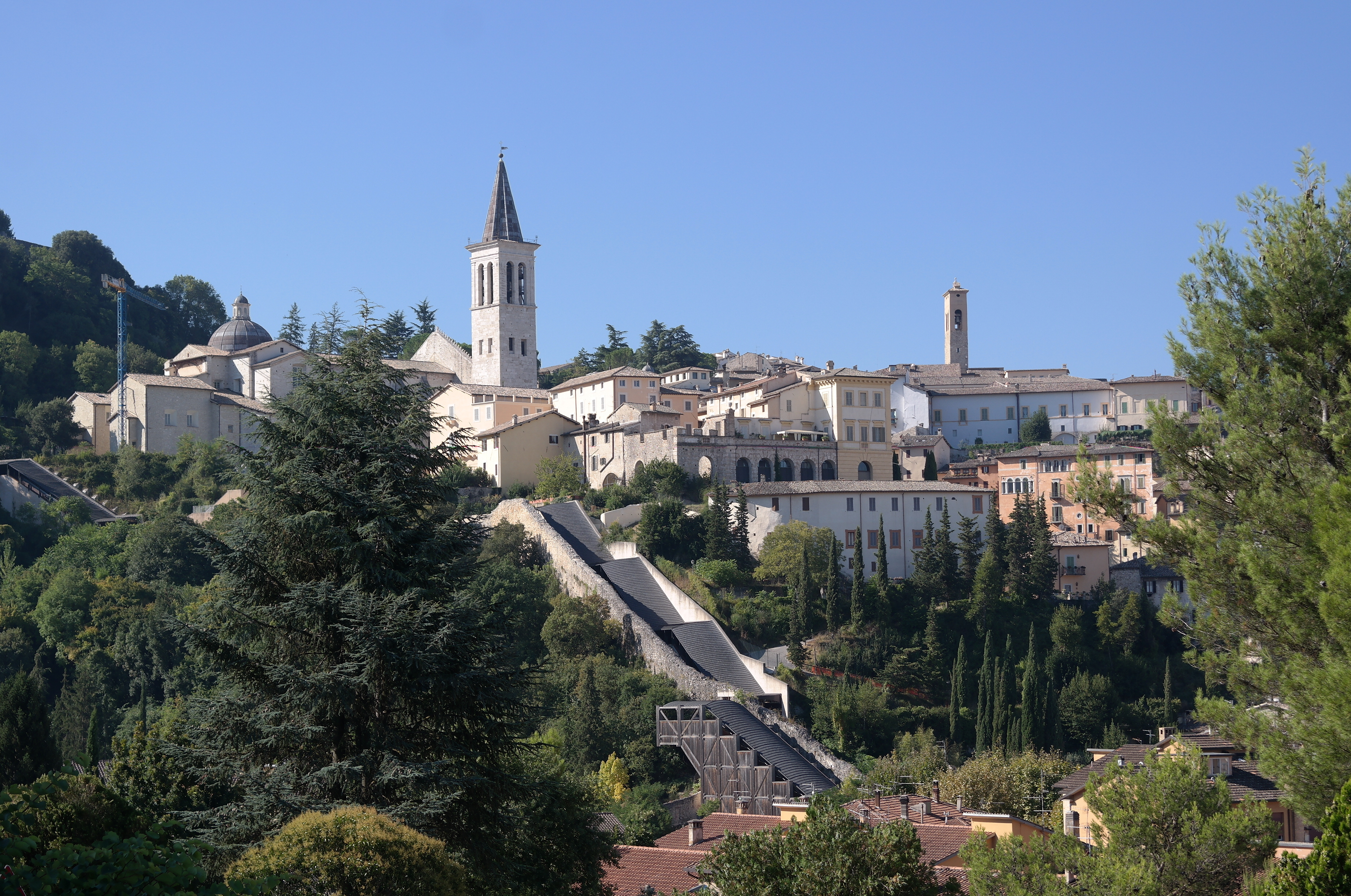 Veduta della città alta di Spoleto